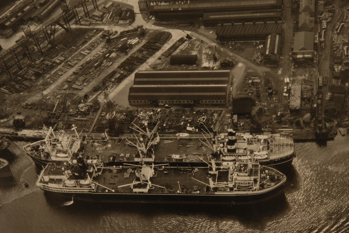 To hvalkokerier, Balaena og Abraham Larsen, ved kai